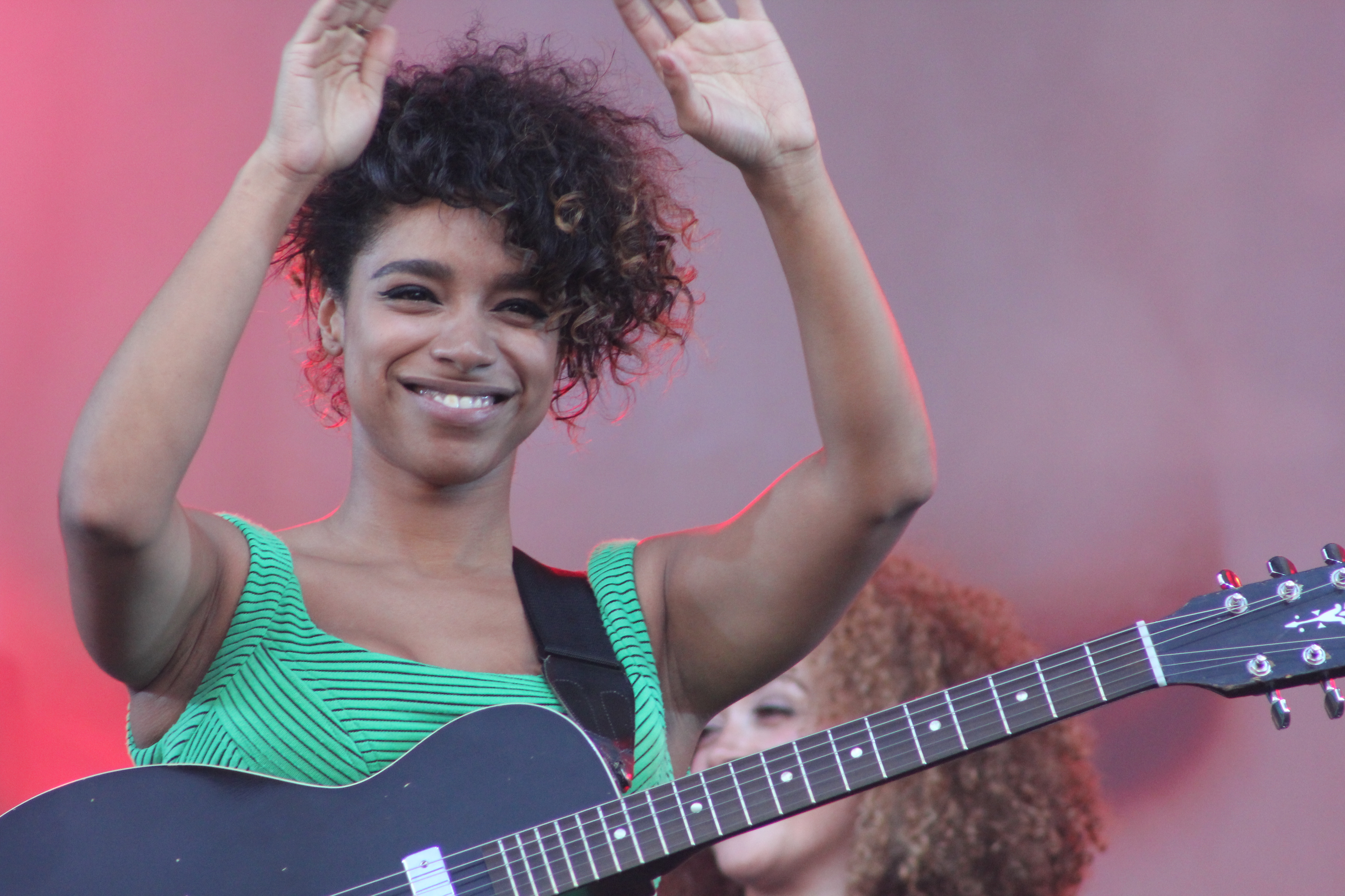 juin 2013 Lianne La Havas Festival rock de tourcoing